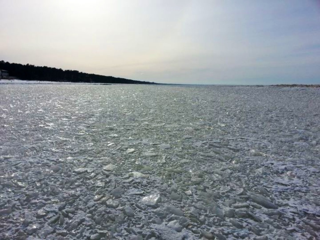 Балтийское море (вид со стороны г. Юрмала) 25.03.2013